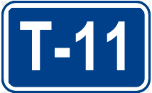 Identificador de la Autovía T-11